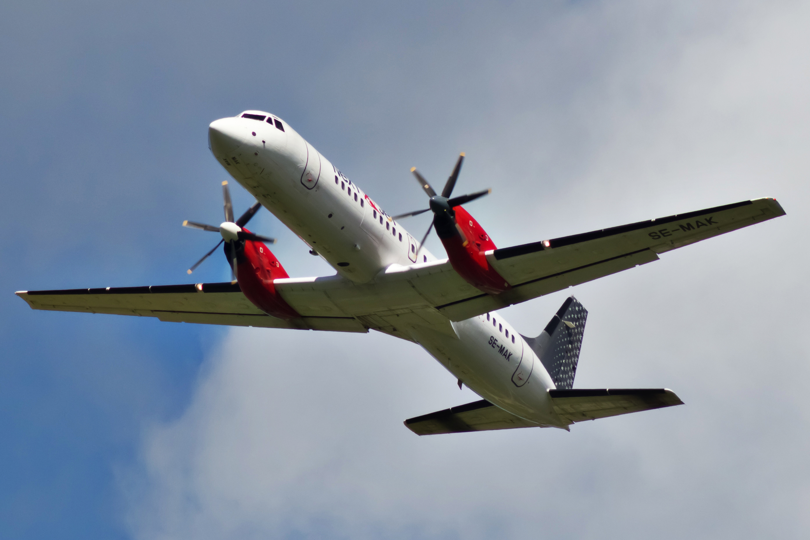 BAe ATP de Nextjet despegando do aeroporto de Visby.